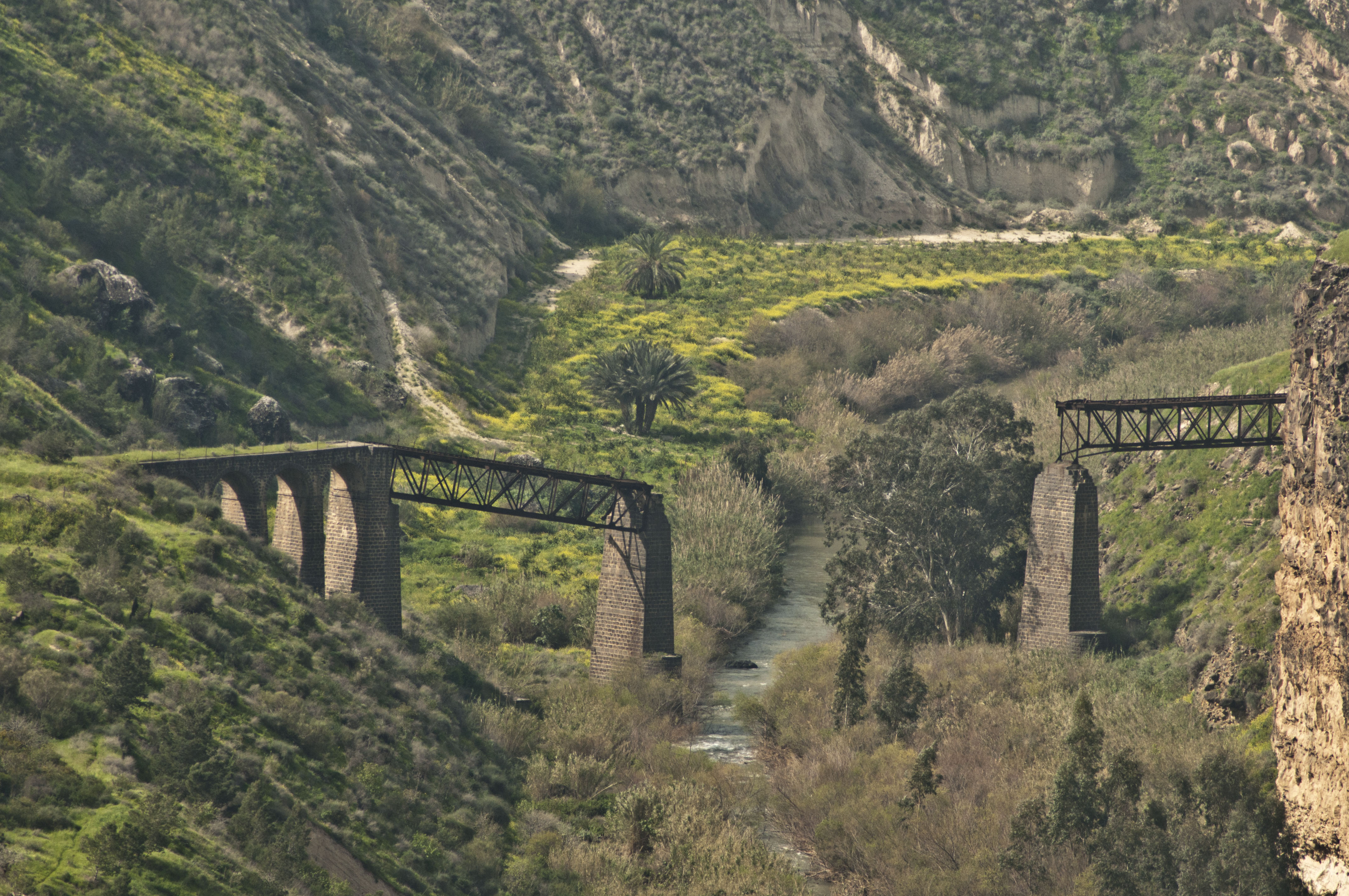 רכבת העמק - מעבירי מים והסוללה - צומת העמקים